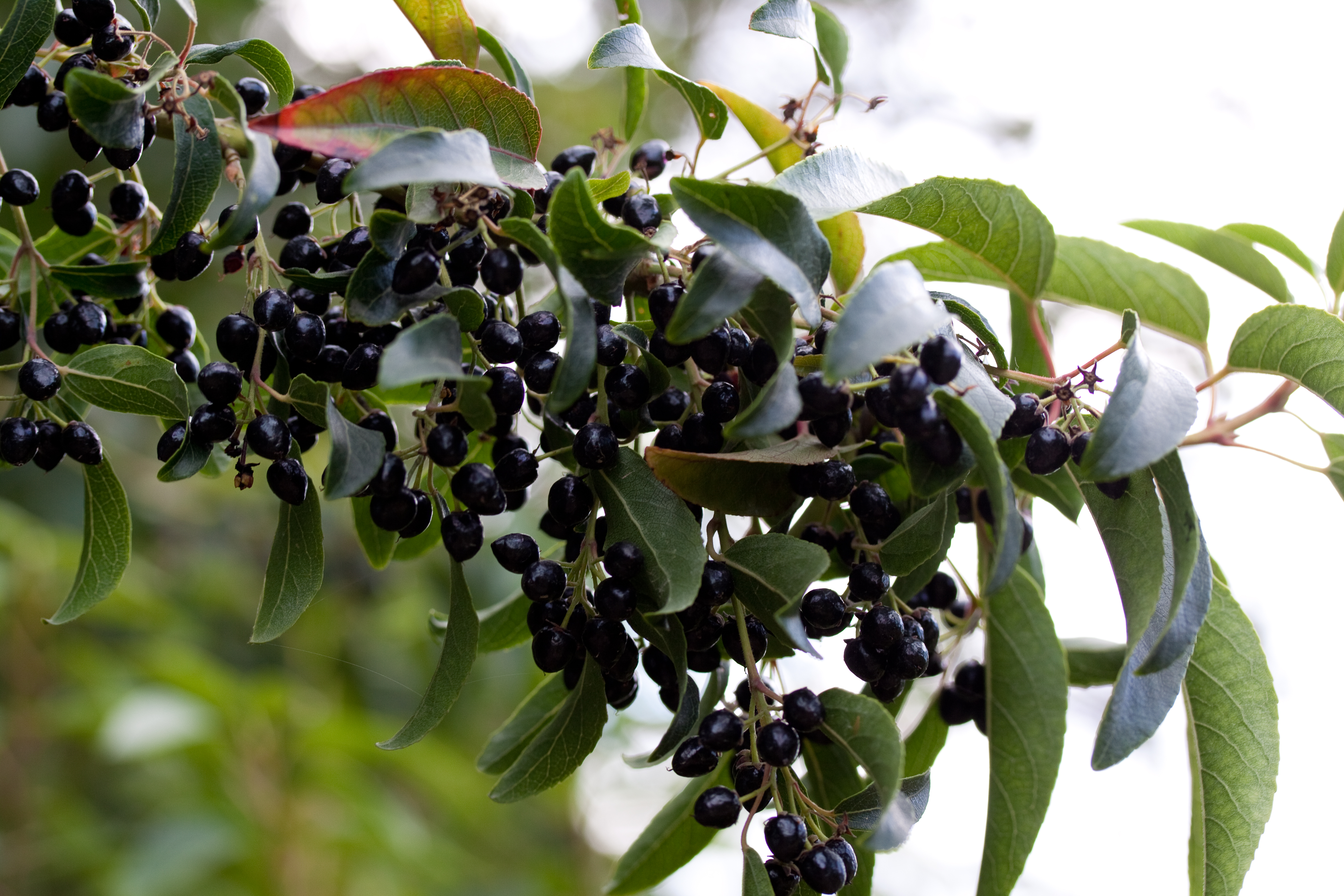 Fruits de Aristotelia chilensis - Jardin des Plantes - Paris - France